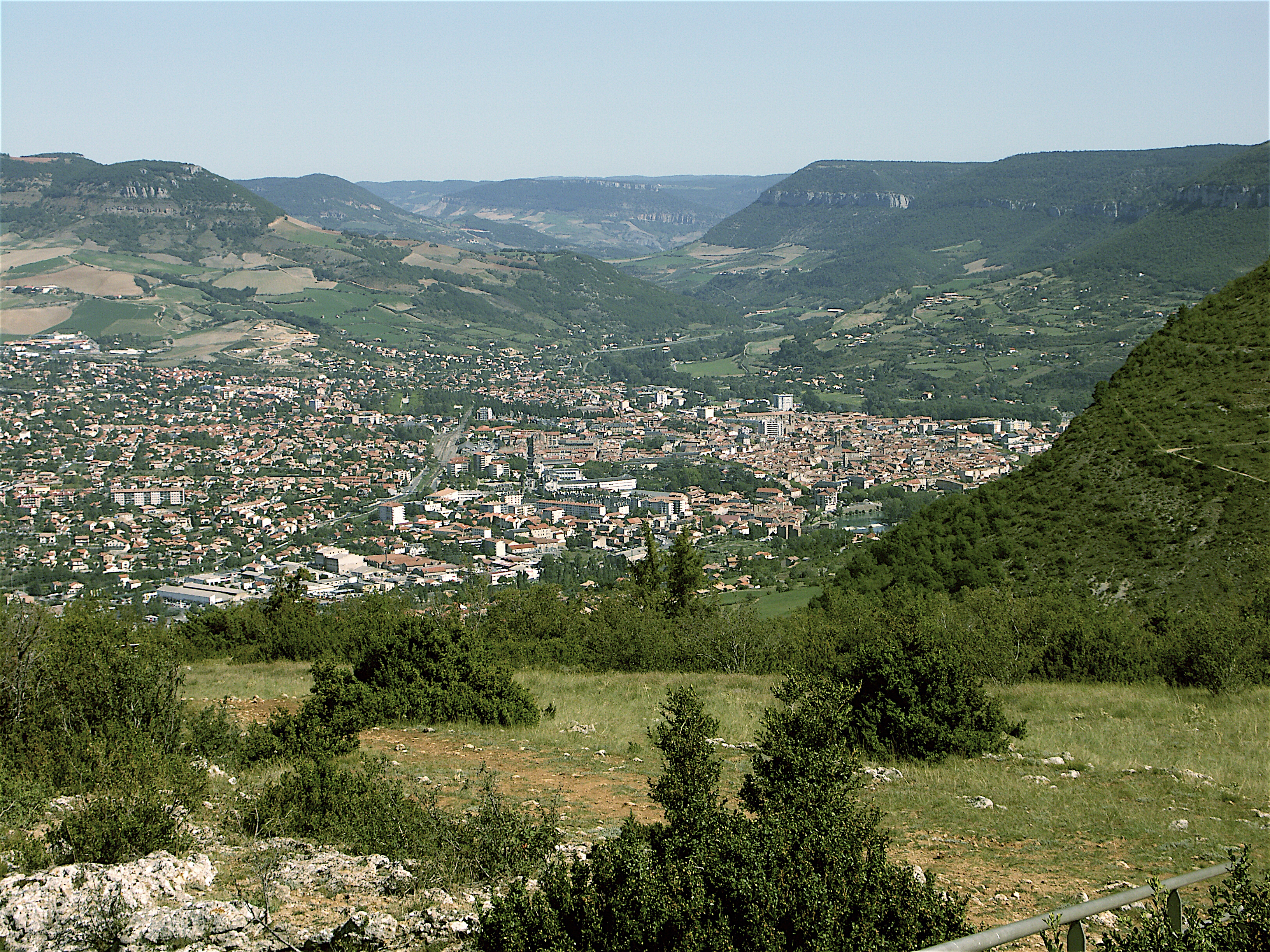 Millau (Aveyron), autre vue générale